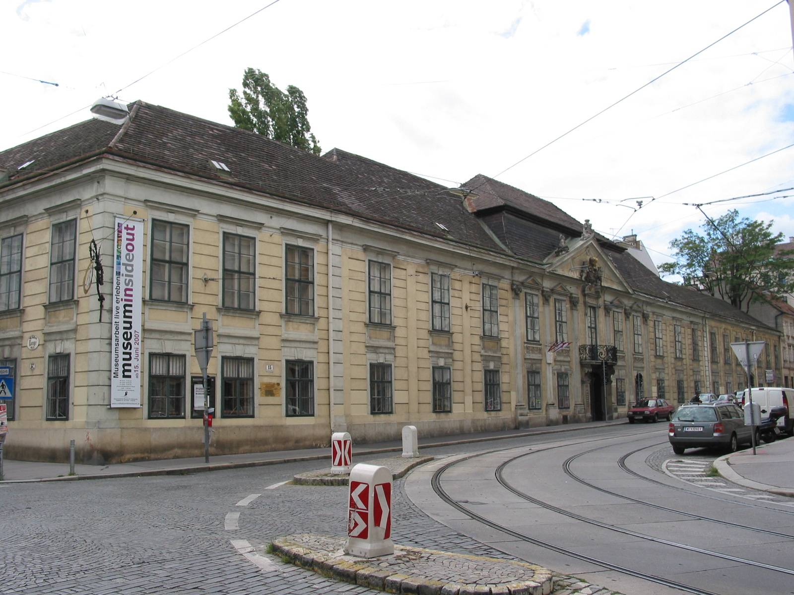 de: Palais Schönborn (Museum für Volkskunde) in Wien en: Palais Schönborn (Folklore museum) in Vienna